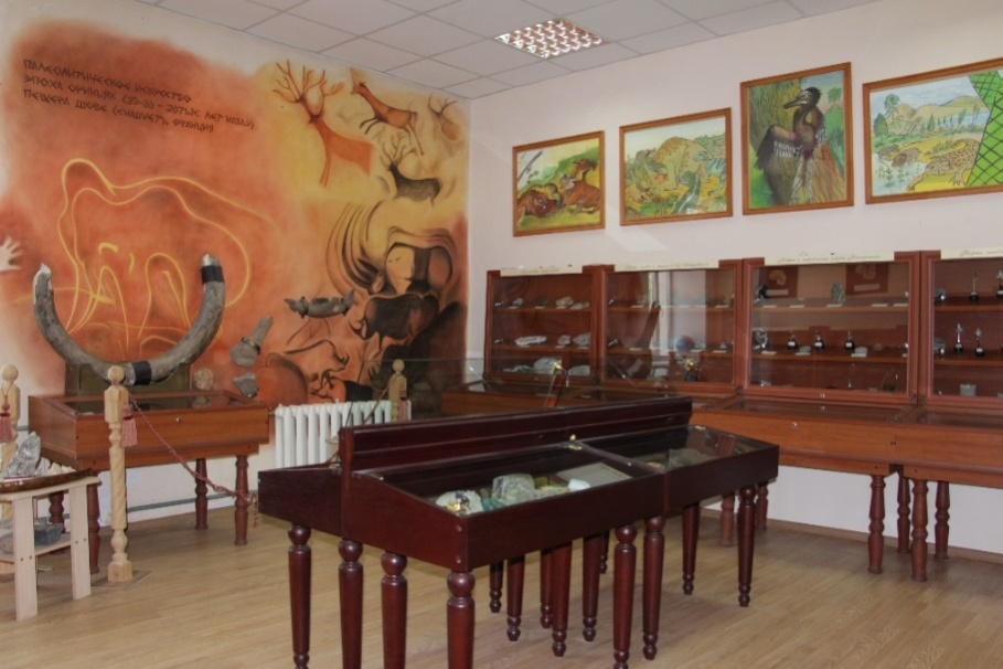 Татарча/tatarça: Халымбаджа3